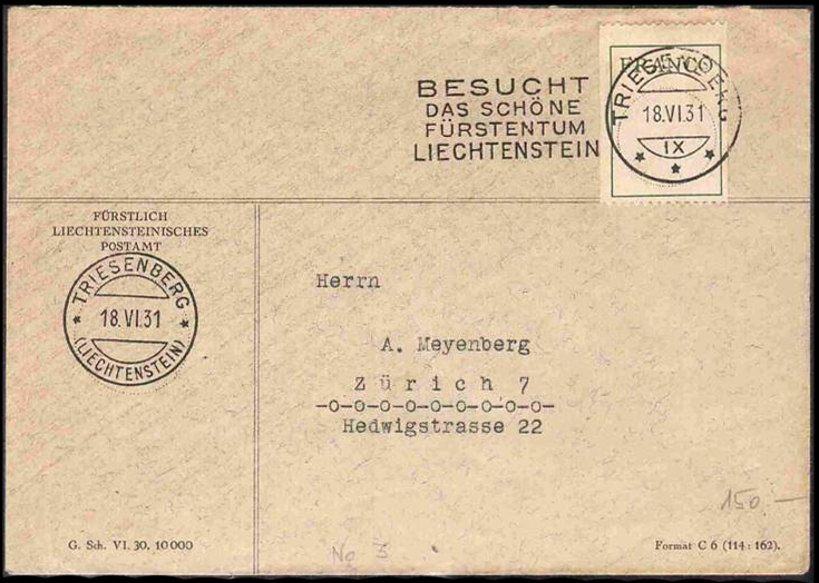 Конверт, отправленный из Тризенберга в Цюрих, оплаченный франко-формуляром